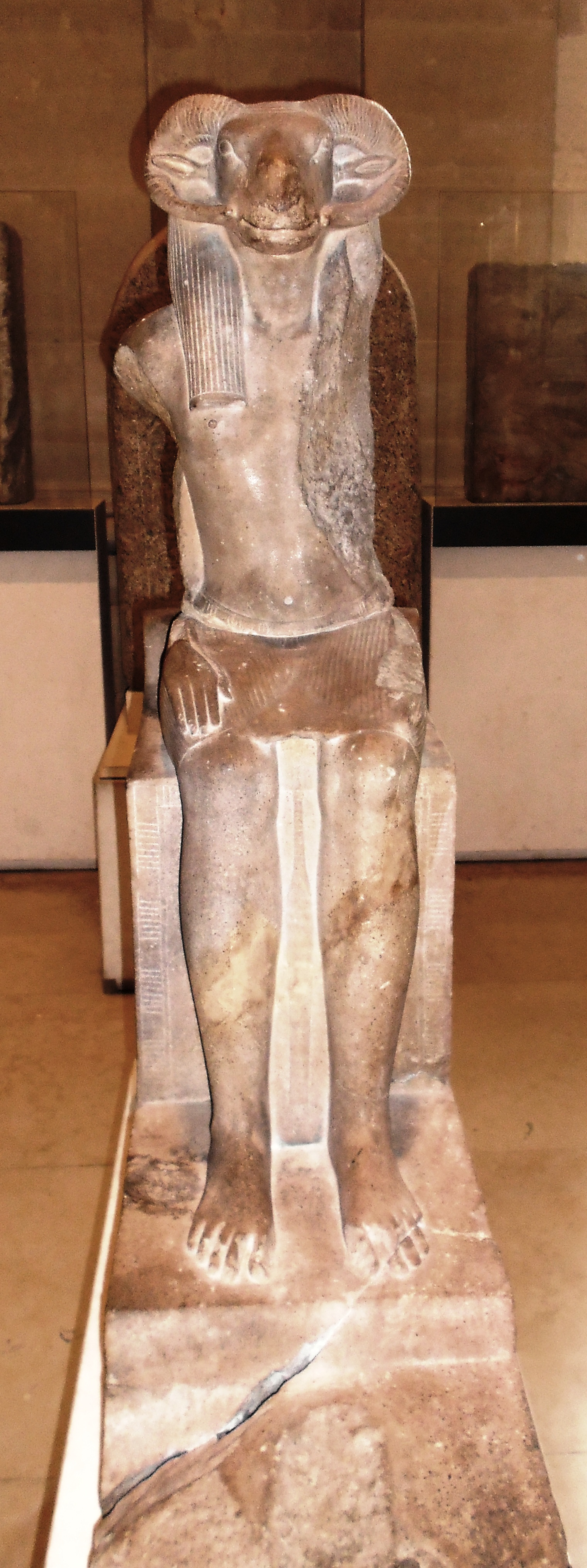 Gottheit mit Widderkopf, wahrscheinlich Amun; Musée du Louvre, Paris